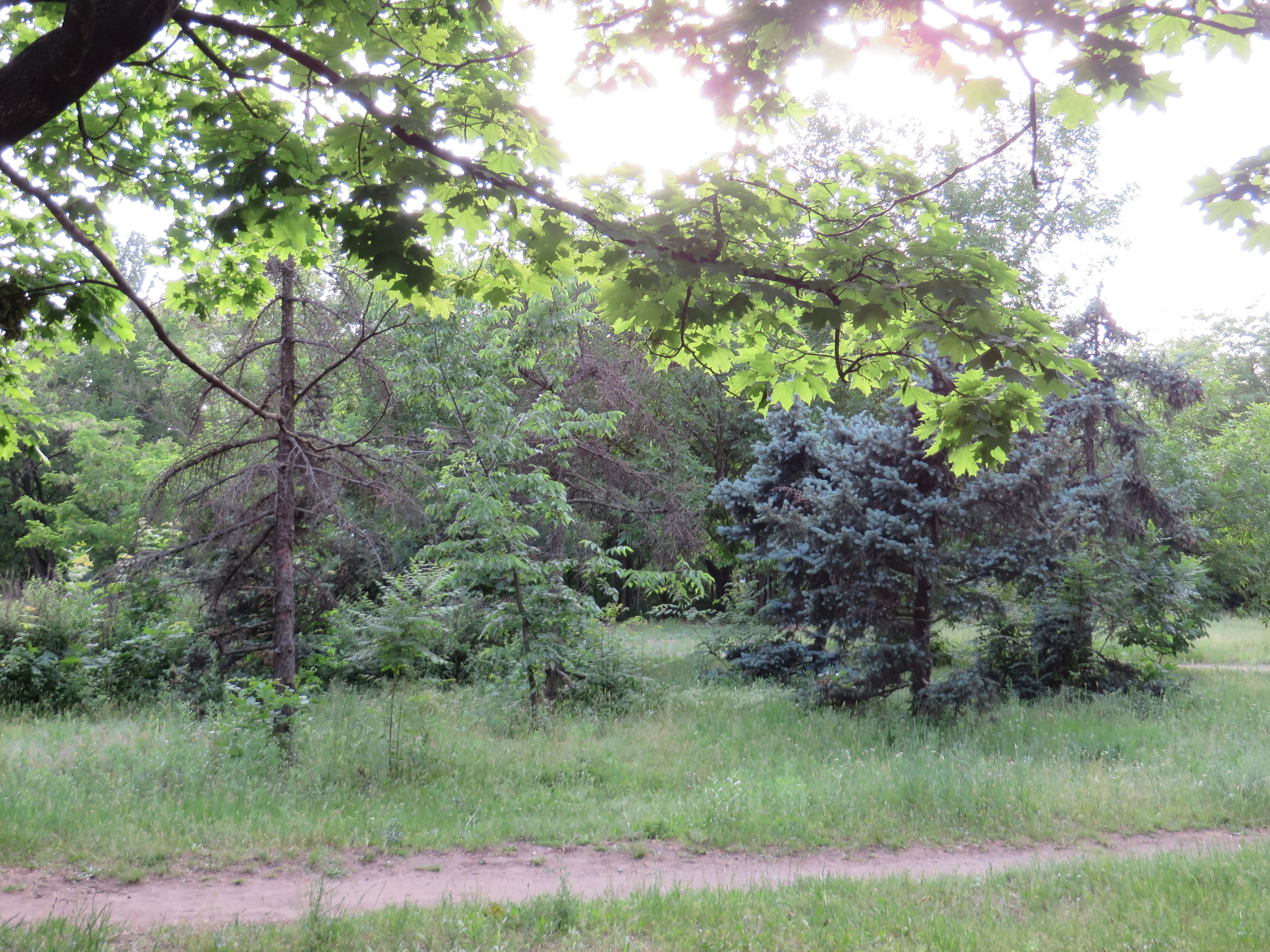 Парк ім. Петровського, м. Миколаїв